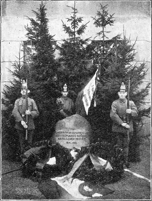 Der 1919 errichtete Gedenkstein vor der Rammelsbergkaserne